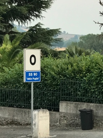 Cartello stradale che segna l'inizio della SS 90